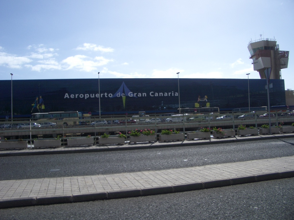 Aeropuerto de Gran Canaria (Gando)